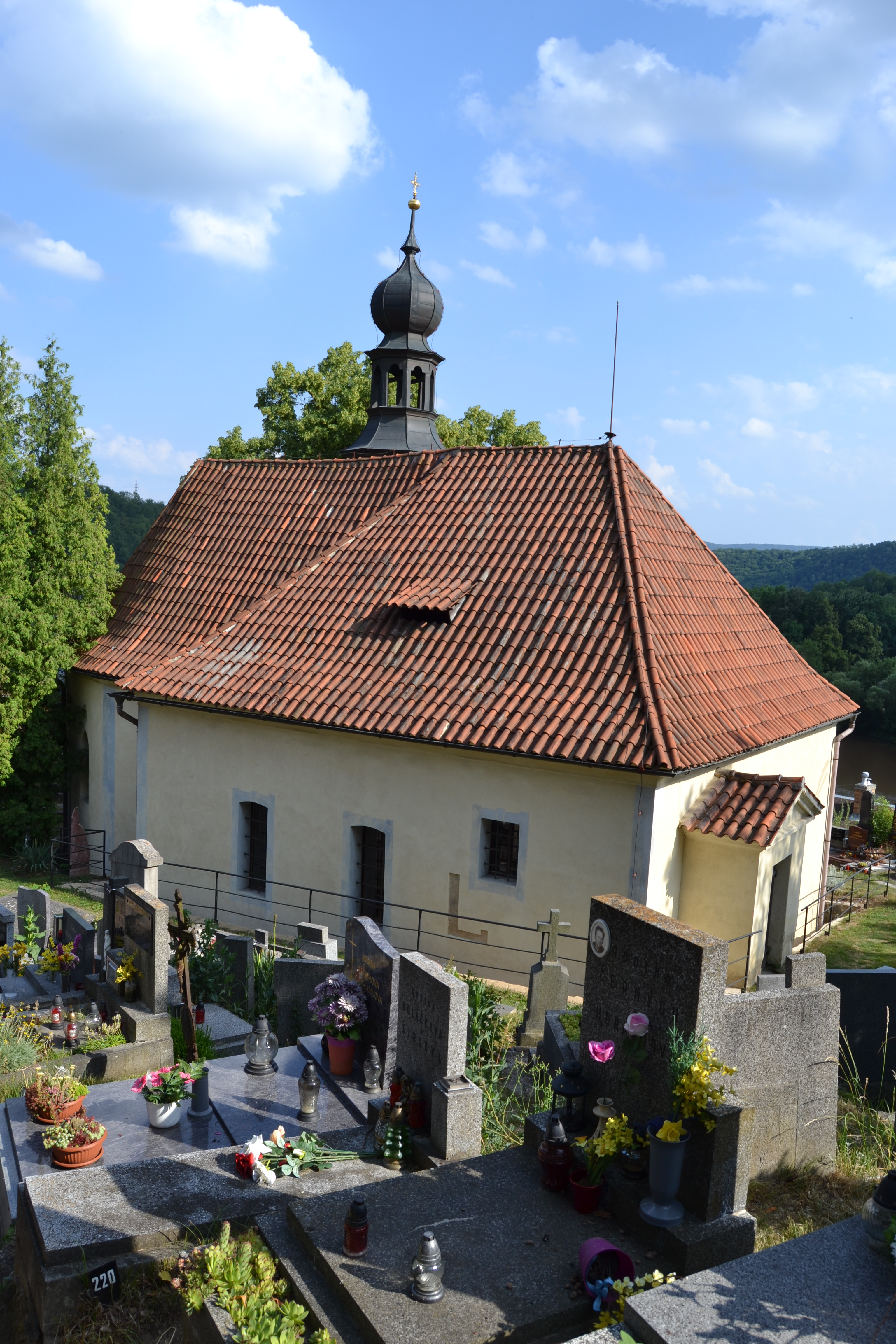 Pohled na kostel sv. Palmácia z hřbitova